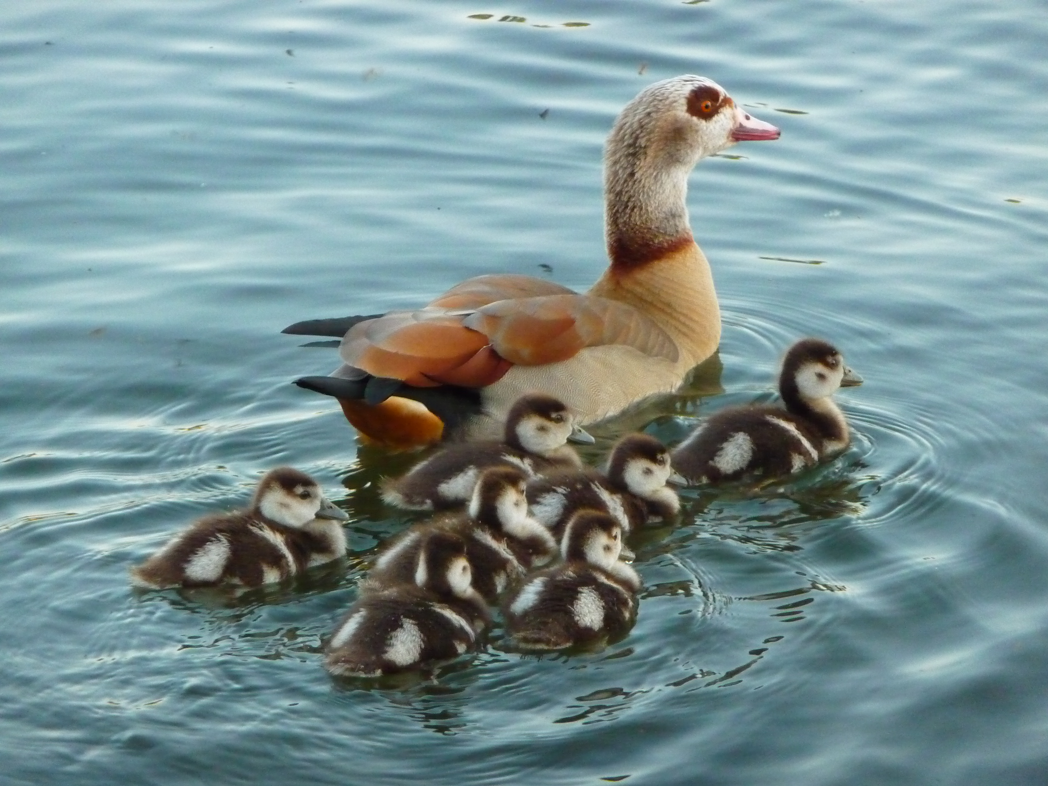 Nilgans (Alopochen aegyptiacus) mit 7 Küken, fotografiert am Neckarufer in Heidelberg (Baden-Württemberg, Deutschland)